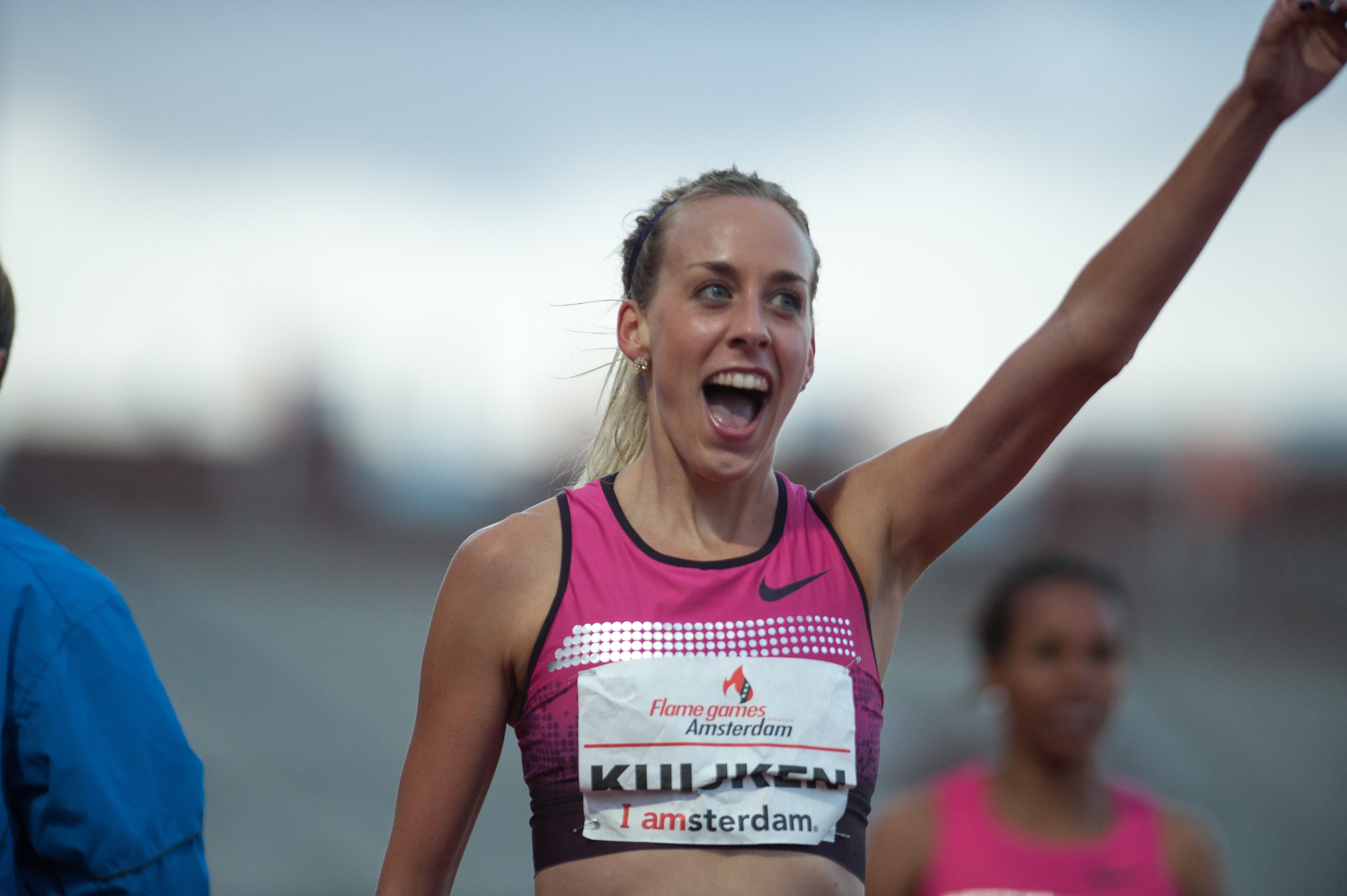 Susan Kuijken juicht na haar overwinning en nationaal record op de 2000 m tijdens de Flame Games 2013.